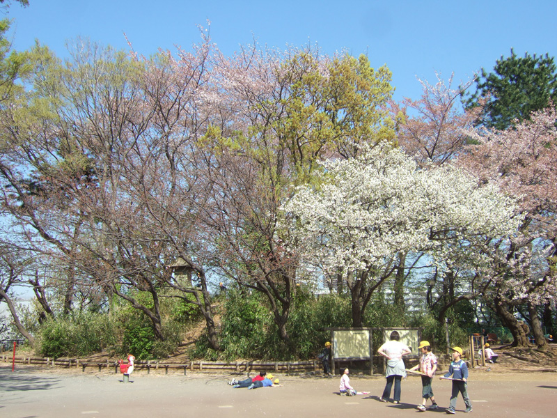 加瀬山・９号古墳